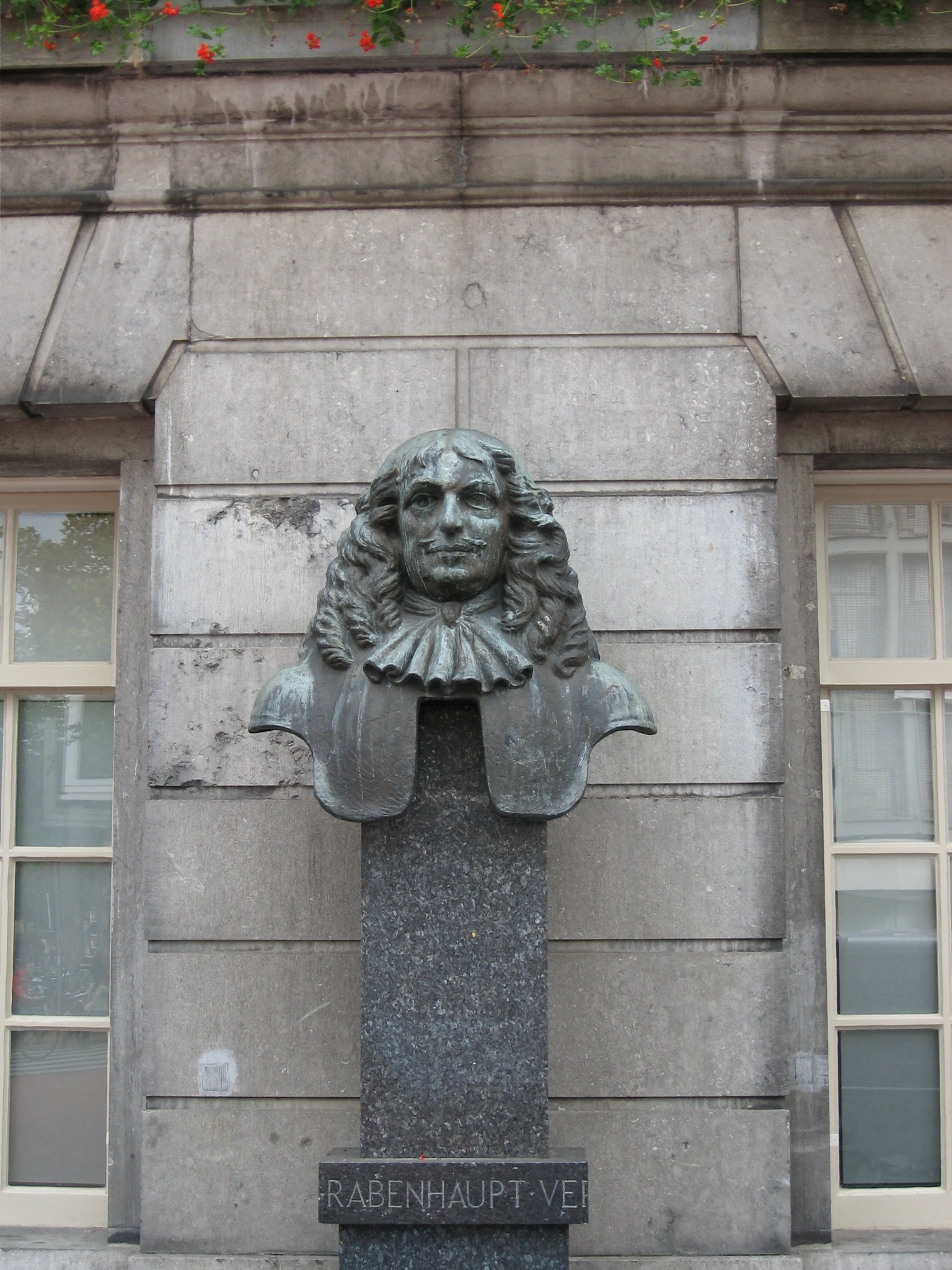 Bust of Carl von Rabenhaupt, in Groningen